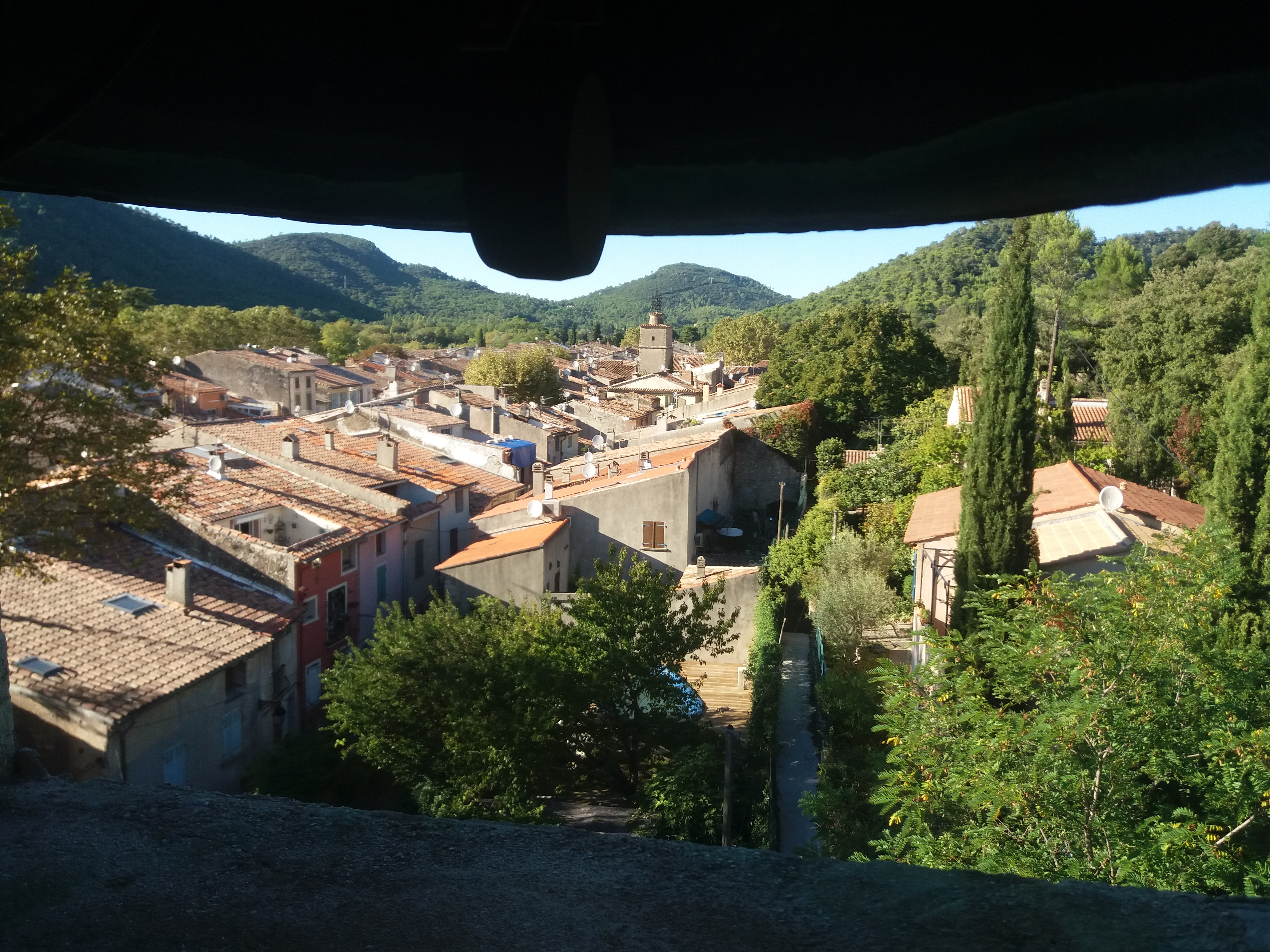 Vue de La Roquebrussanne depuis le clocher de l'église